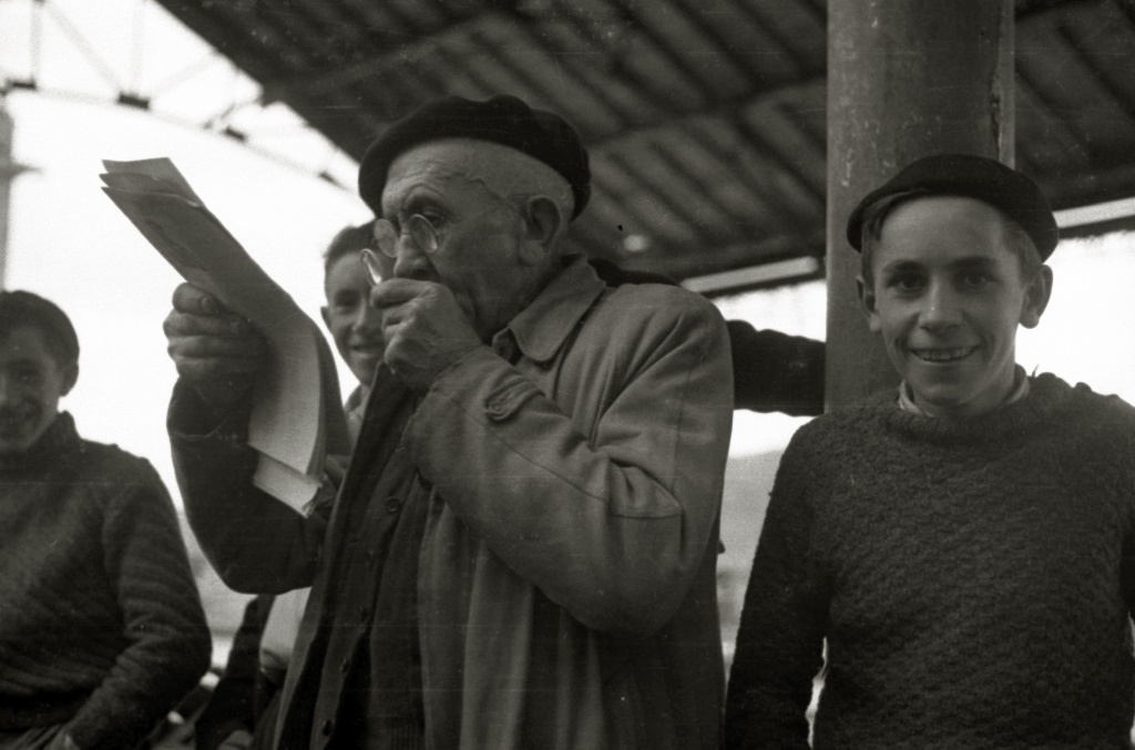 Título original: El bertsolari Eusebio Muguerza Azpiazu 'Mendaro Txirritaka' (1/2) Localización: Guipúzcoa